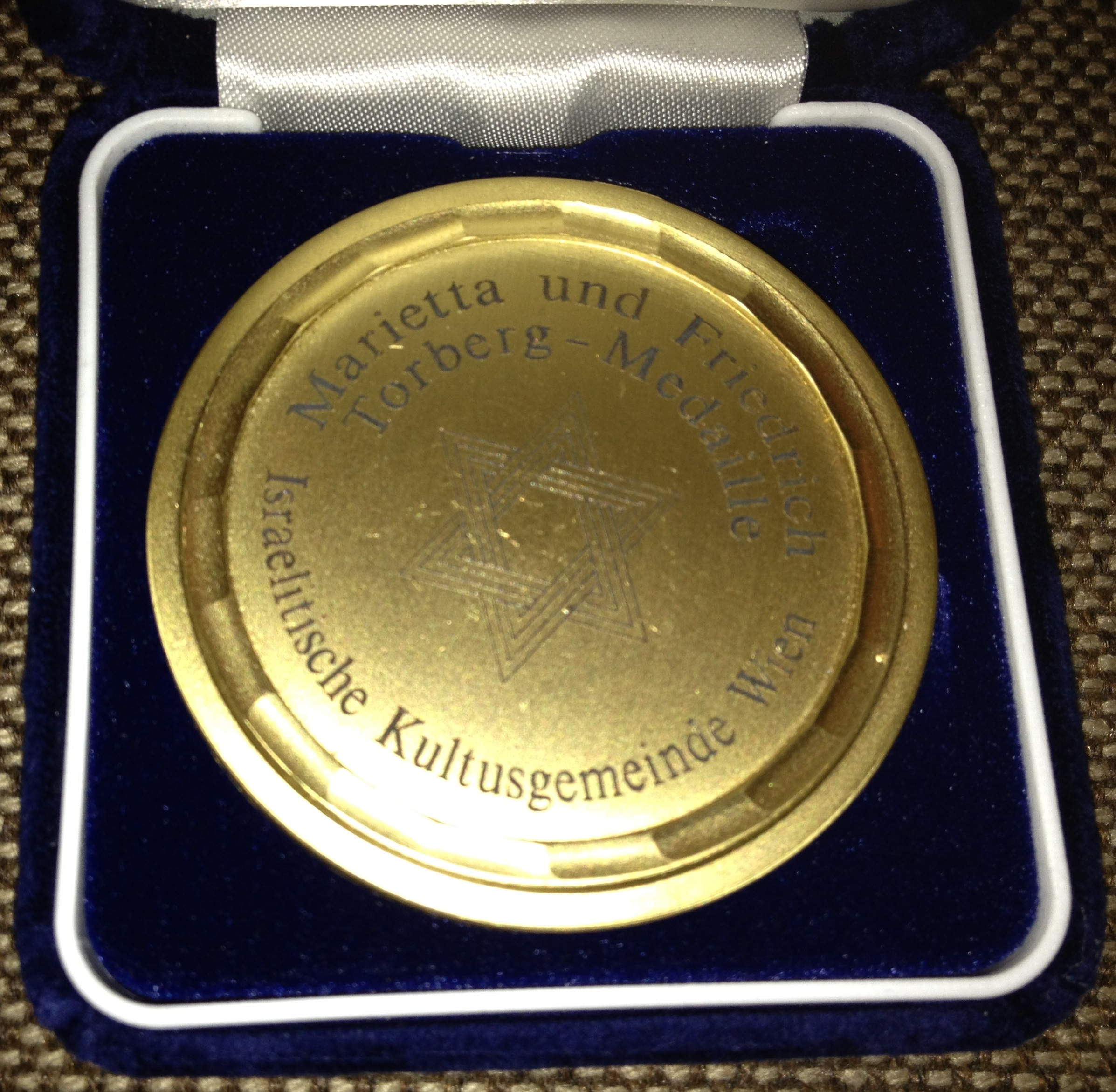 Bei der Verleihung am 19. November 2012 aufgenommen